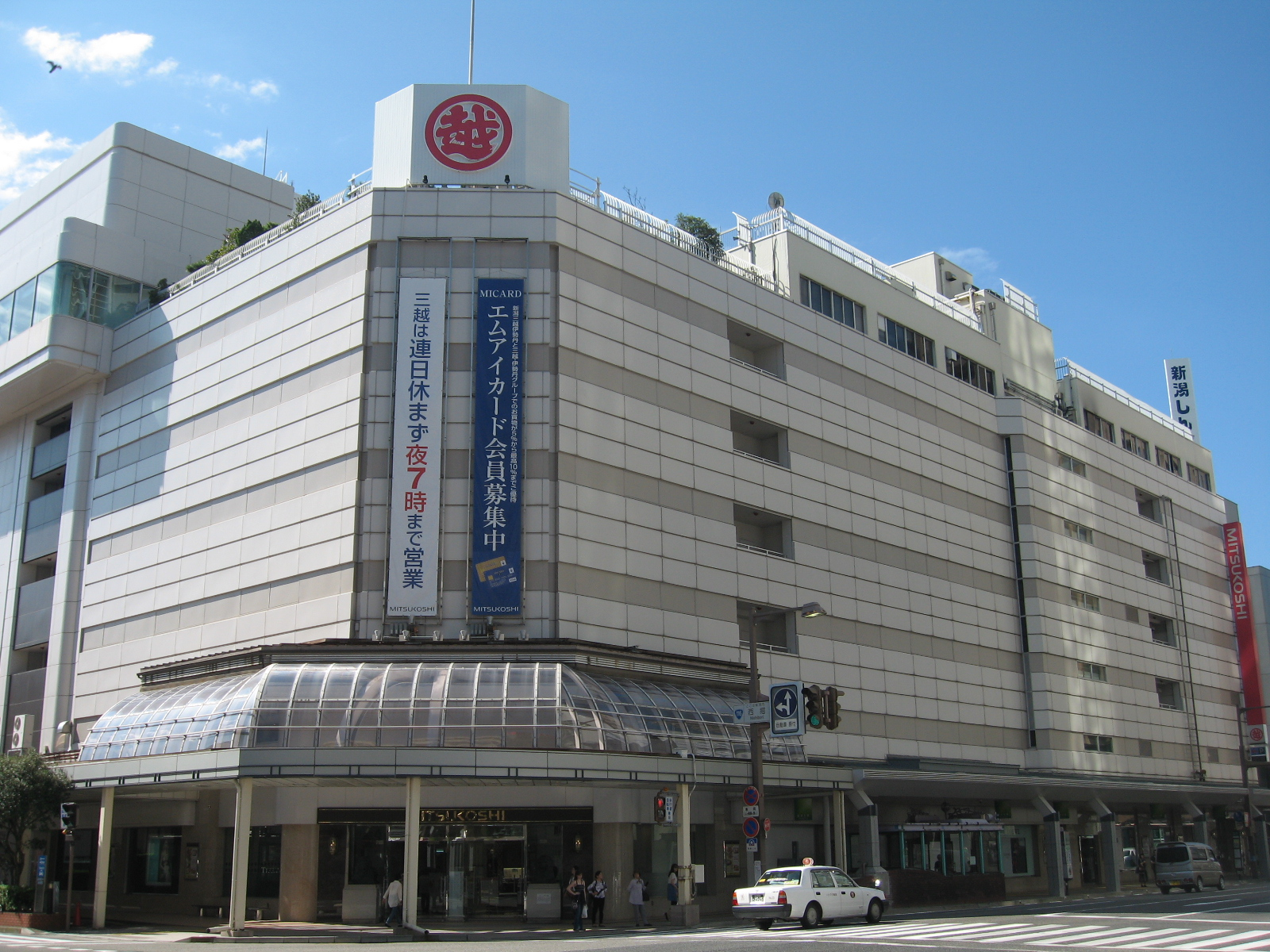 新潟三越の画像。